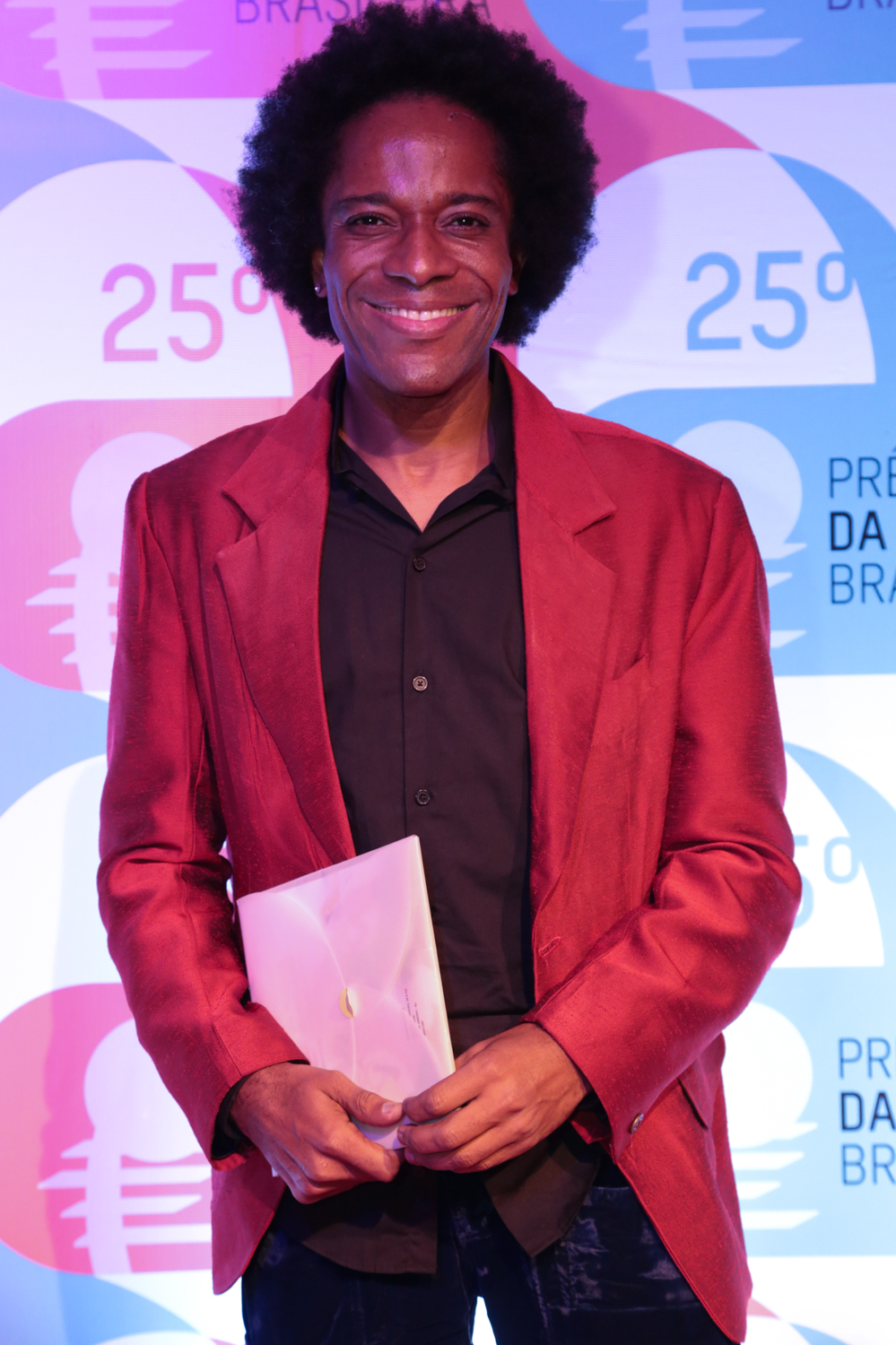 Flávio Bauraqui durante o 25º Prêmio da Música Brasileira no Theatro Municipal. Foto: Reginaldo Teixeira (14/05/14)